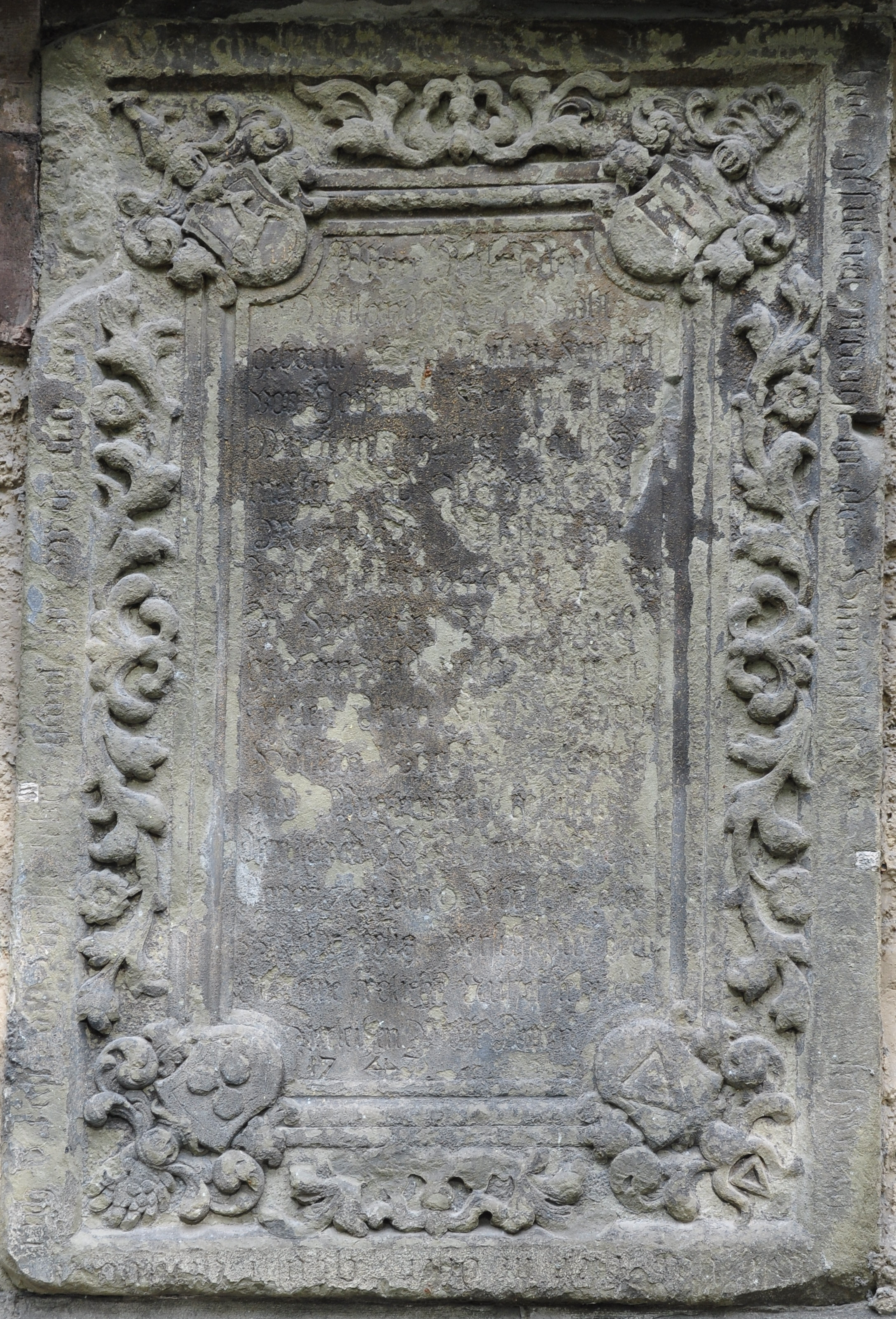 Stuttgart, Hospitalkirche, Epitaph an der Außenwand